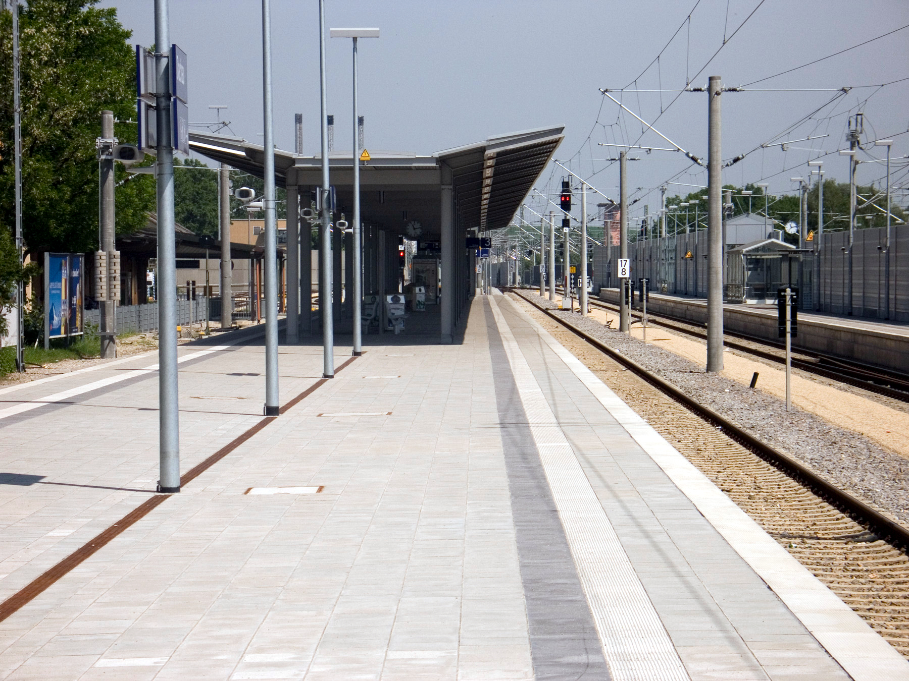 Dachau train station